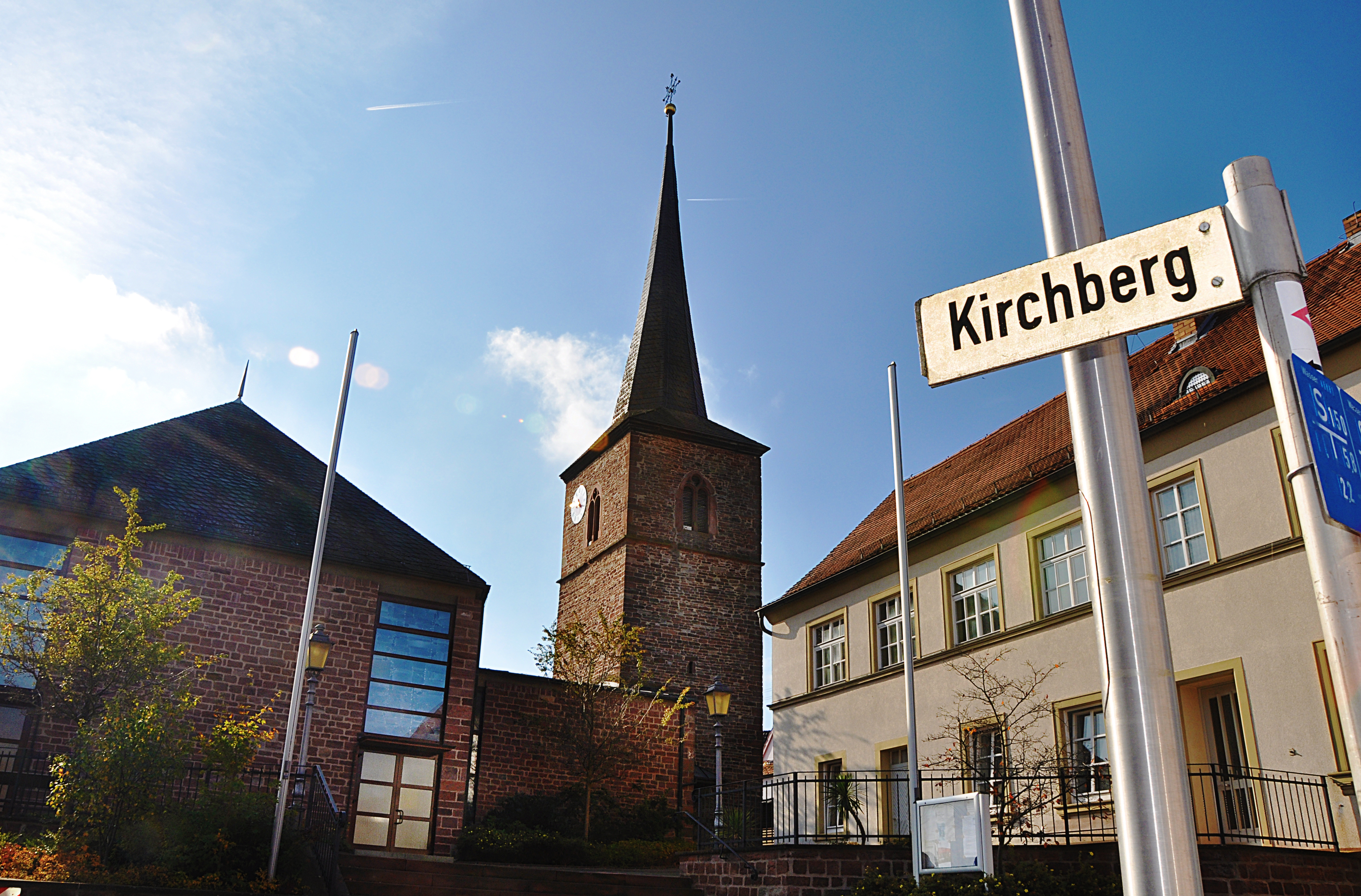 Die Kirche sowie die alte Schule von Wittershausen